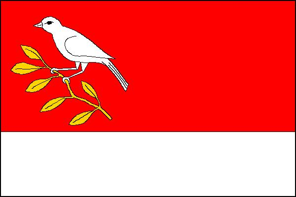 Vlajka obce Podolí (okres Brno-venkov)